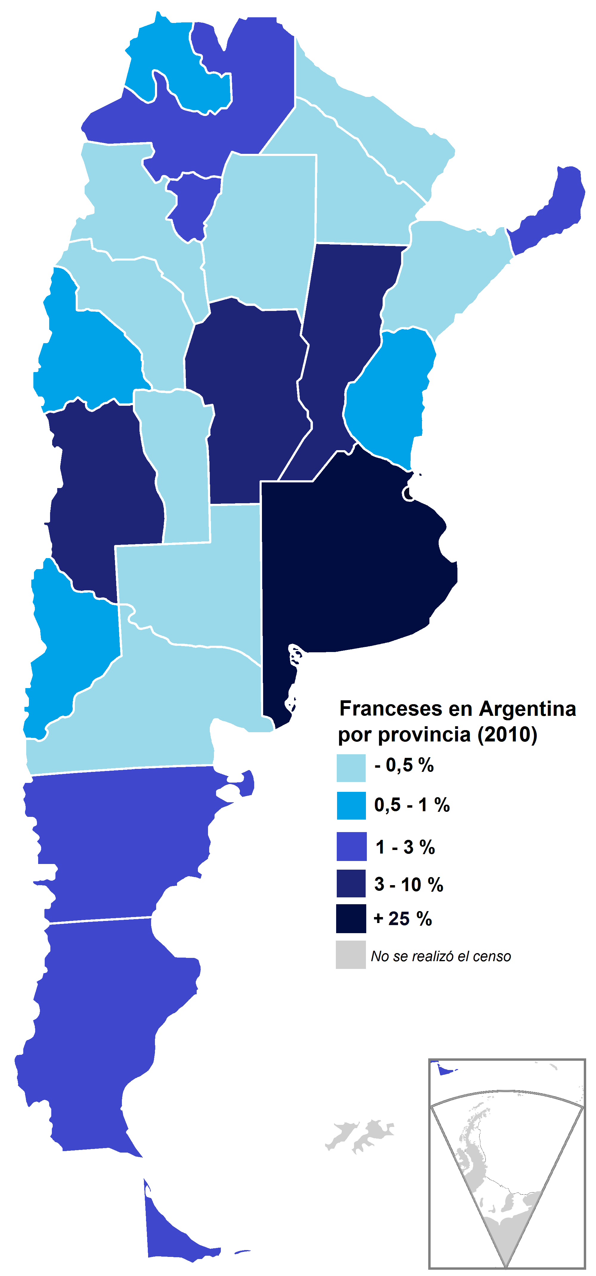 República Argentina por provincia. Población nacida en Francia, en porcentaje. Año 2010. Fuente: Censo 2010 - INDEC.